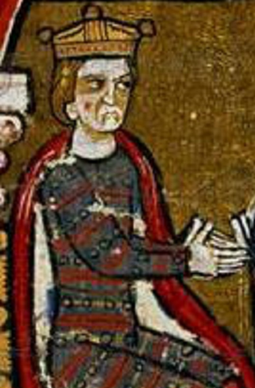 Pedro II de Aragón el Católico en un acto feudal en febrero de 1198. Es la única imagen contemporánea al rey de Aragón que se conoce. Aparece sentado en el trono y coronado. Liber feudorum Ceritaniae (1200-1209), fol. 64v.. Reg. n.º 4. Archivo de la Corona de Aragón (ACA), n.º 270. ES.08019.ACA/9.1.5.1. Referencia: Martín Alvira Cabrer, Muret 1213. La batalla decisiva de la cruzada contra los cátaros, Barcelona, Ariel, 2008, ilustraciones entre págs. 128-129, ilustración 5ª.